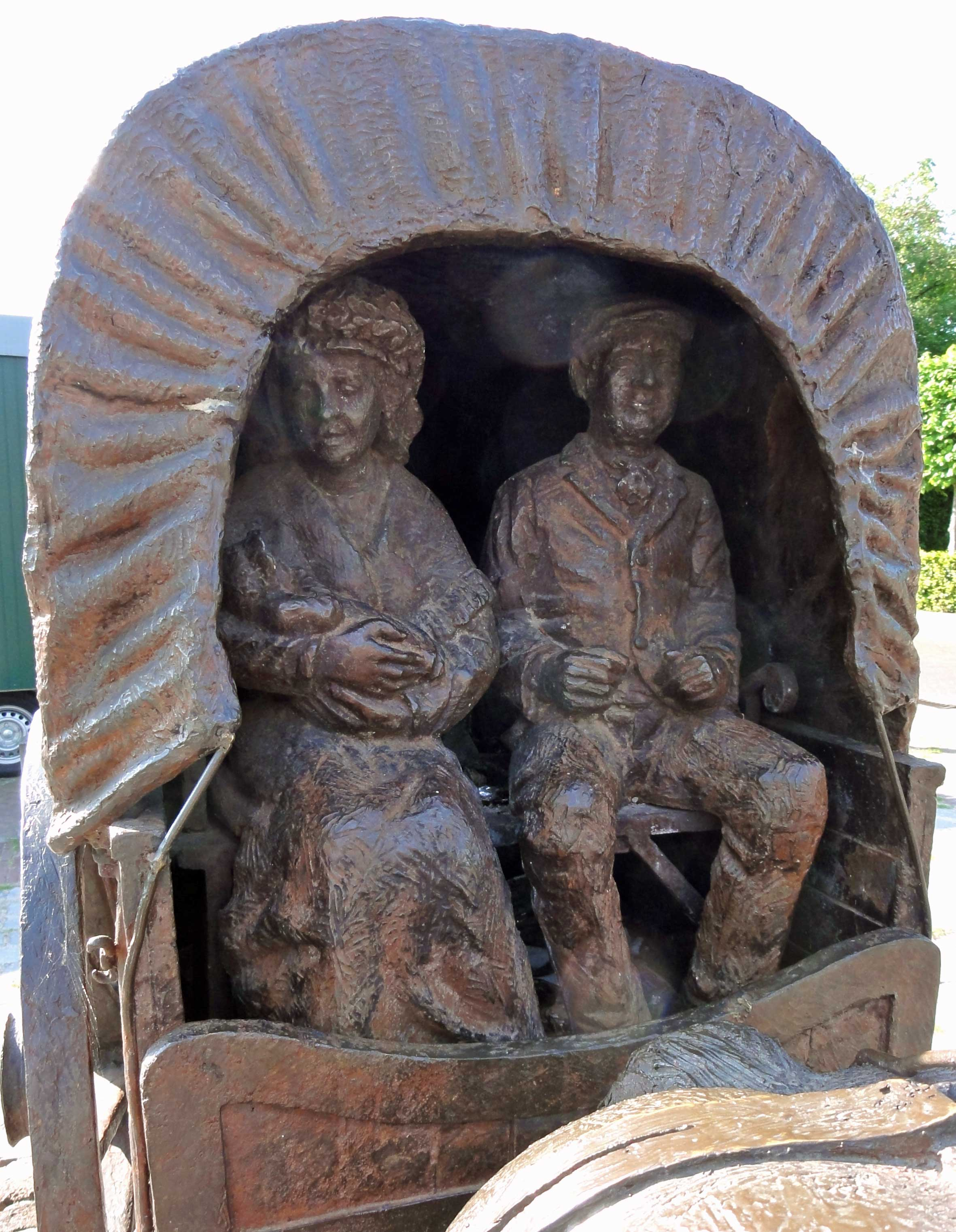 "Caastere kermis" beeld gemaakt door Toon Grassens - Casteren